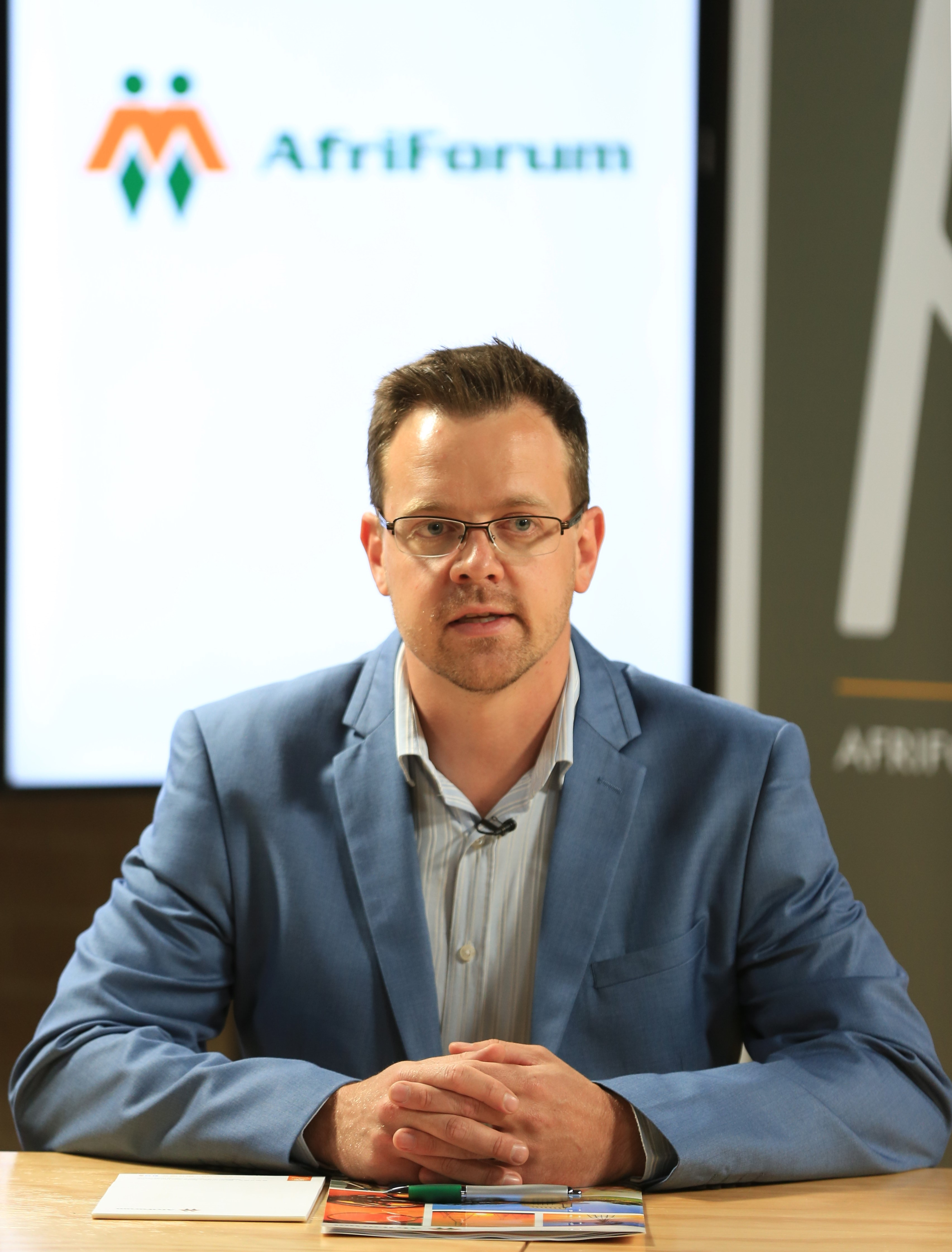 Ernst Roets, adjunk -uitvoerende hoof van AfriForum.